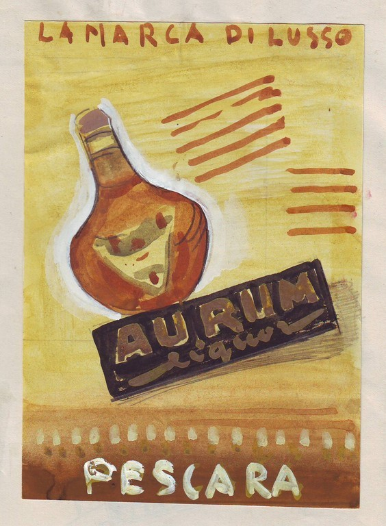 La marca di lusso, manifesto pubblicitario del prodotto della distilleria Aurum, Pescara sec. XX (AS Pescara, Archivio storico del Comune di Pescara, cat. X commissioni edilizie, b. 22, fasc. 3, sottofasc. 7)